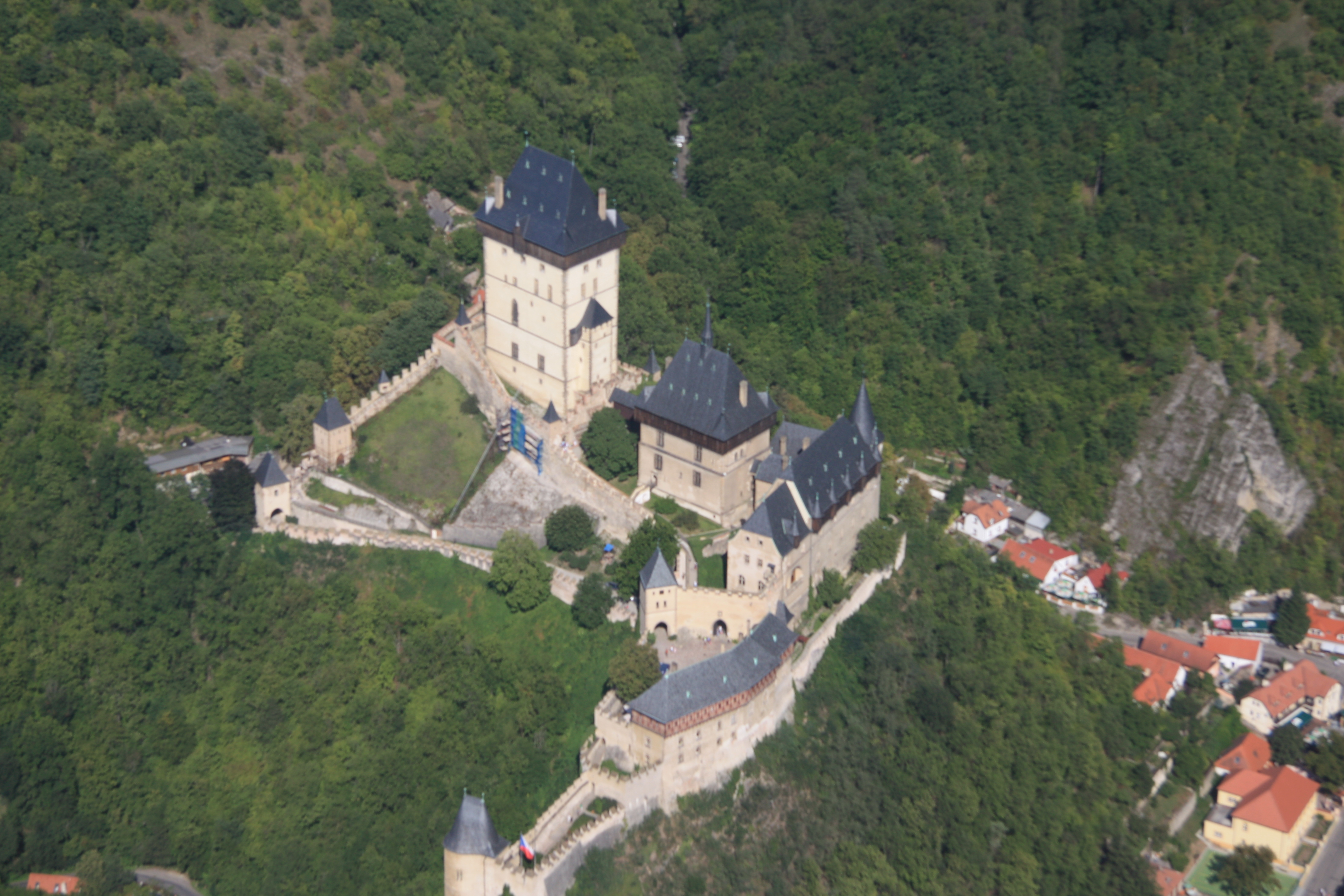 Karlstejn - letecký pohled na romantizující gotiku